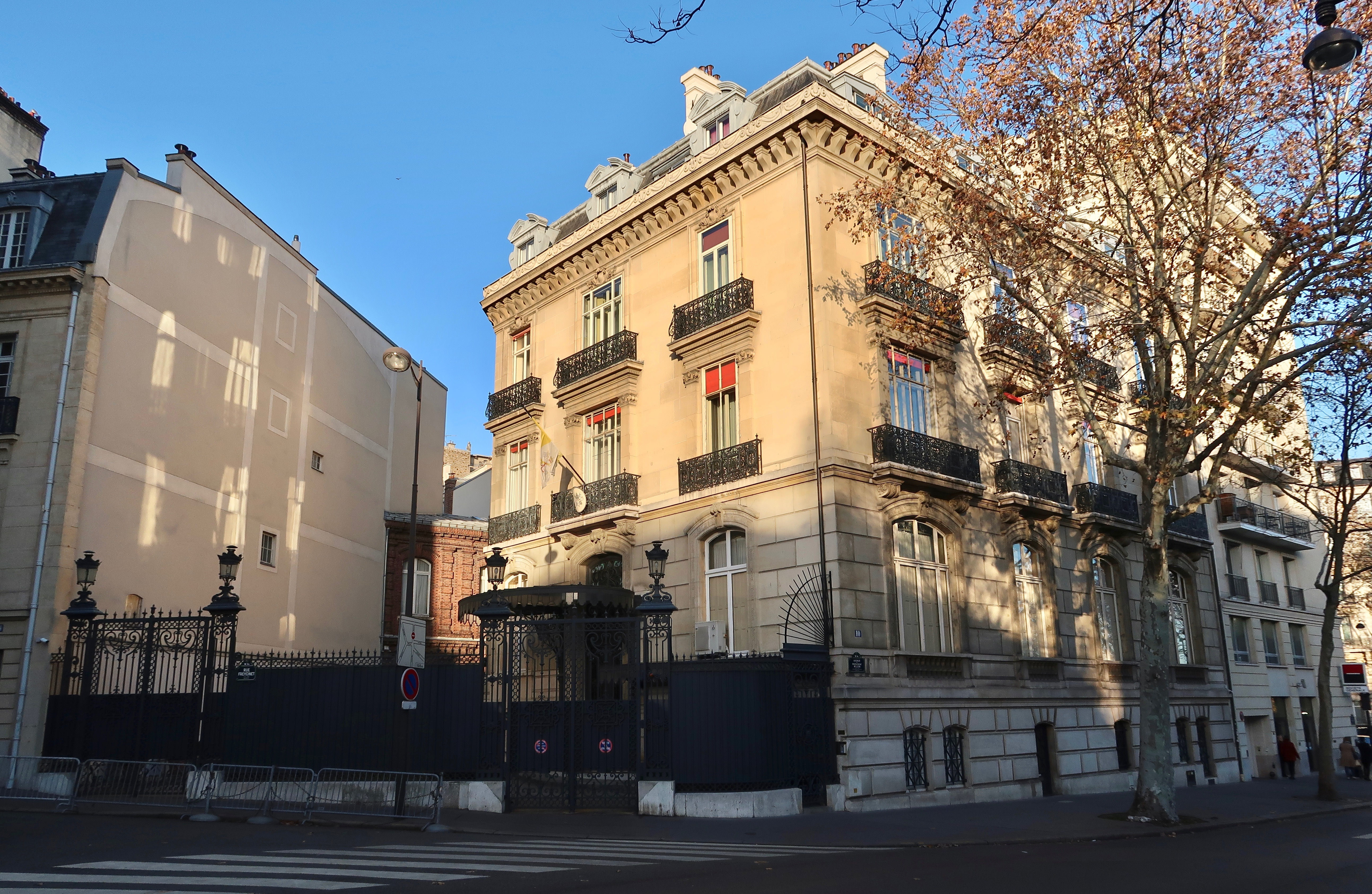 Nonciature apostolique en France, au croisement suivant : 4 rue Freycinet et 10 avenue du Président-Wilson (Paris, 16e).